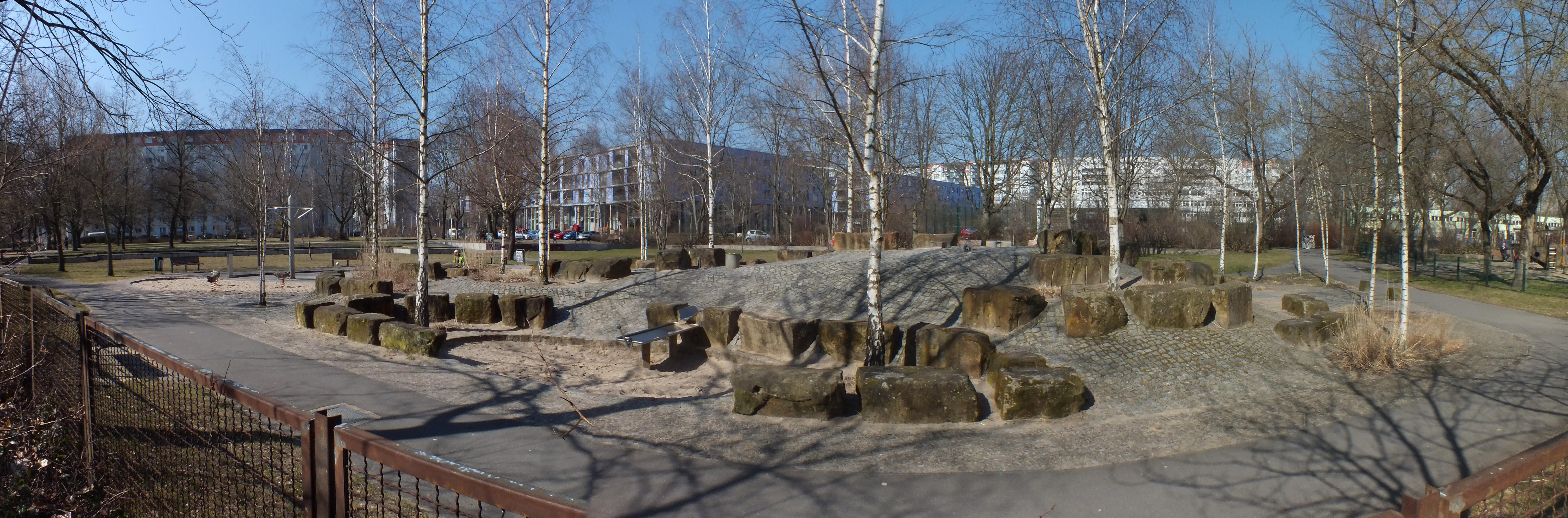 Quartierspark Mellenseestraße, kleines Panorama